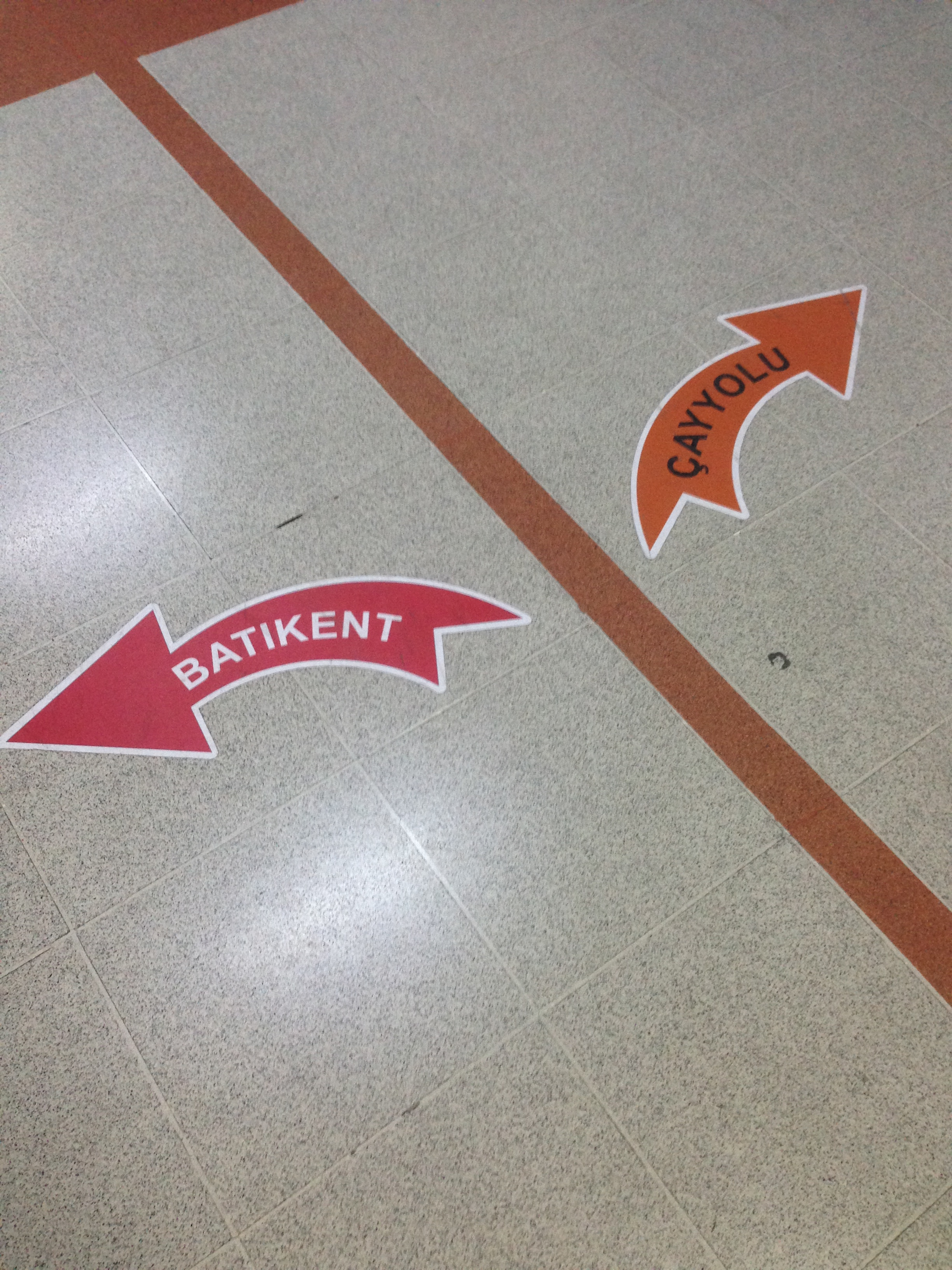 Çayyolu Metrosu